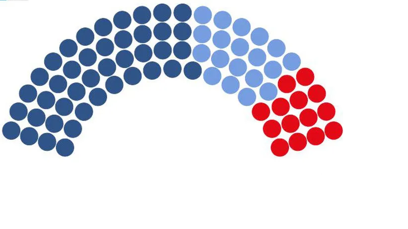 Composição parlamento galego 2020